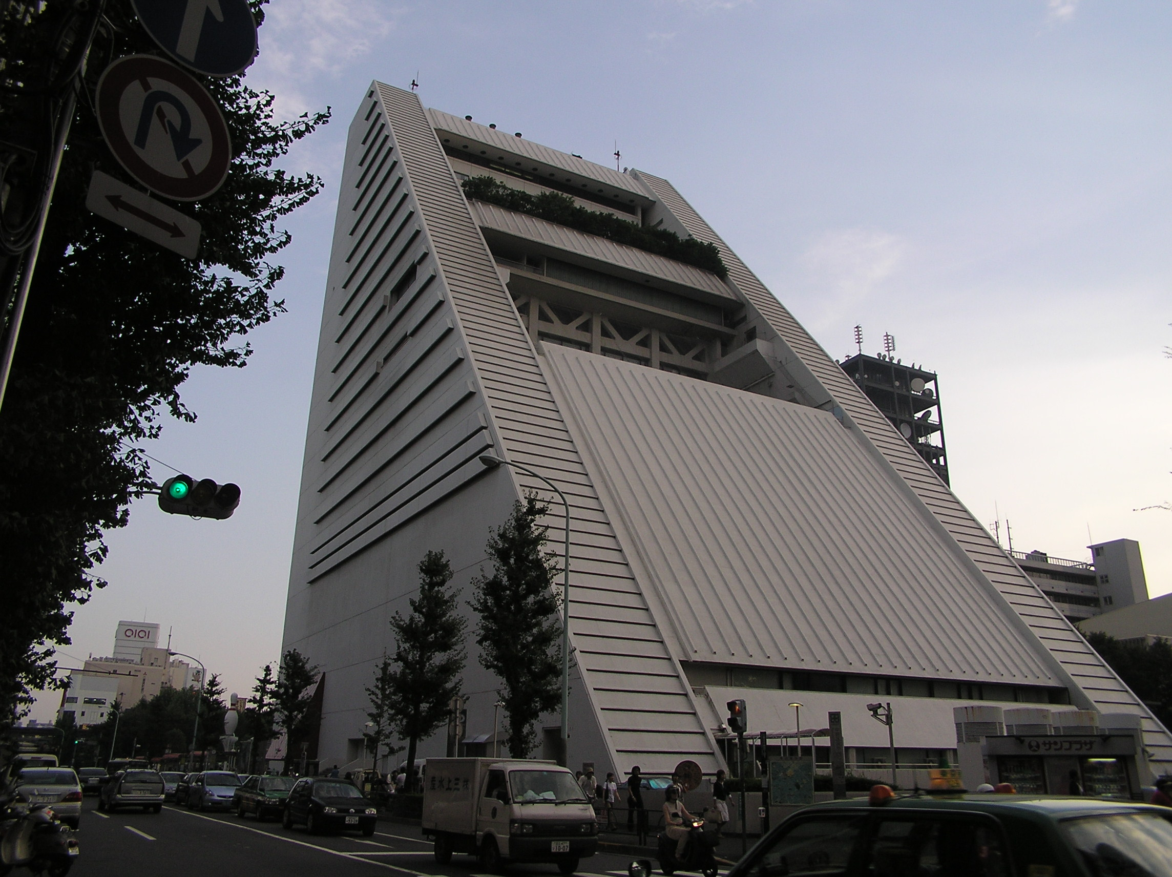 Nakano Sun Plaza